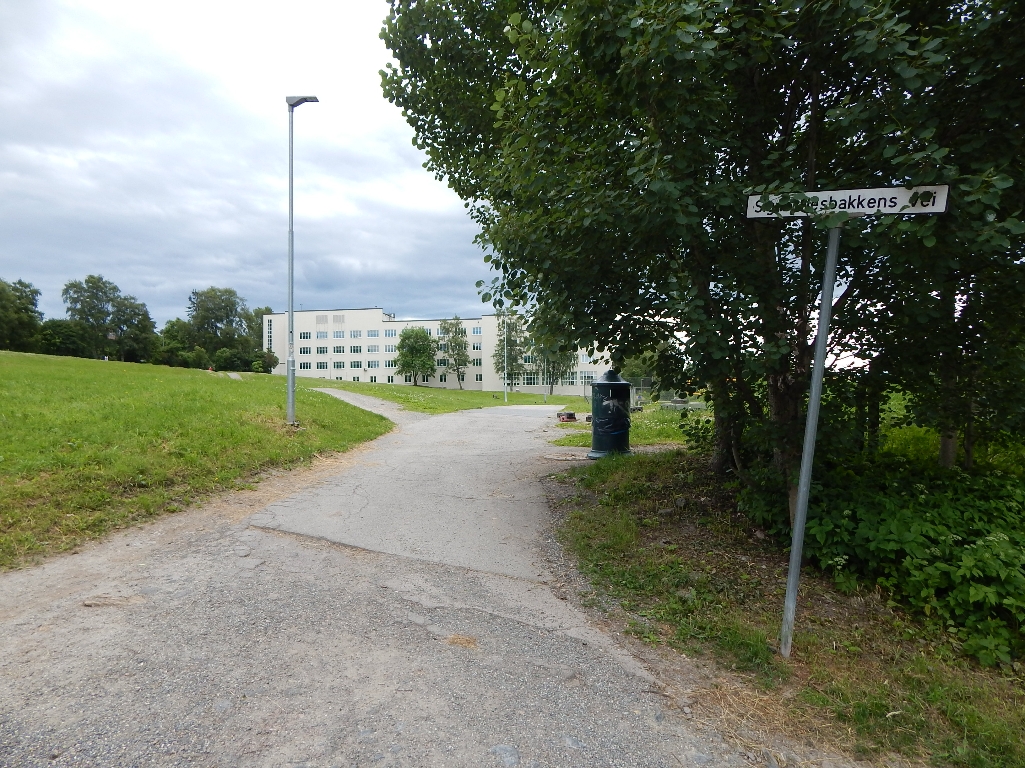 Signe Nesbakkens vei sett fra Båhusveien